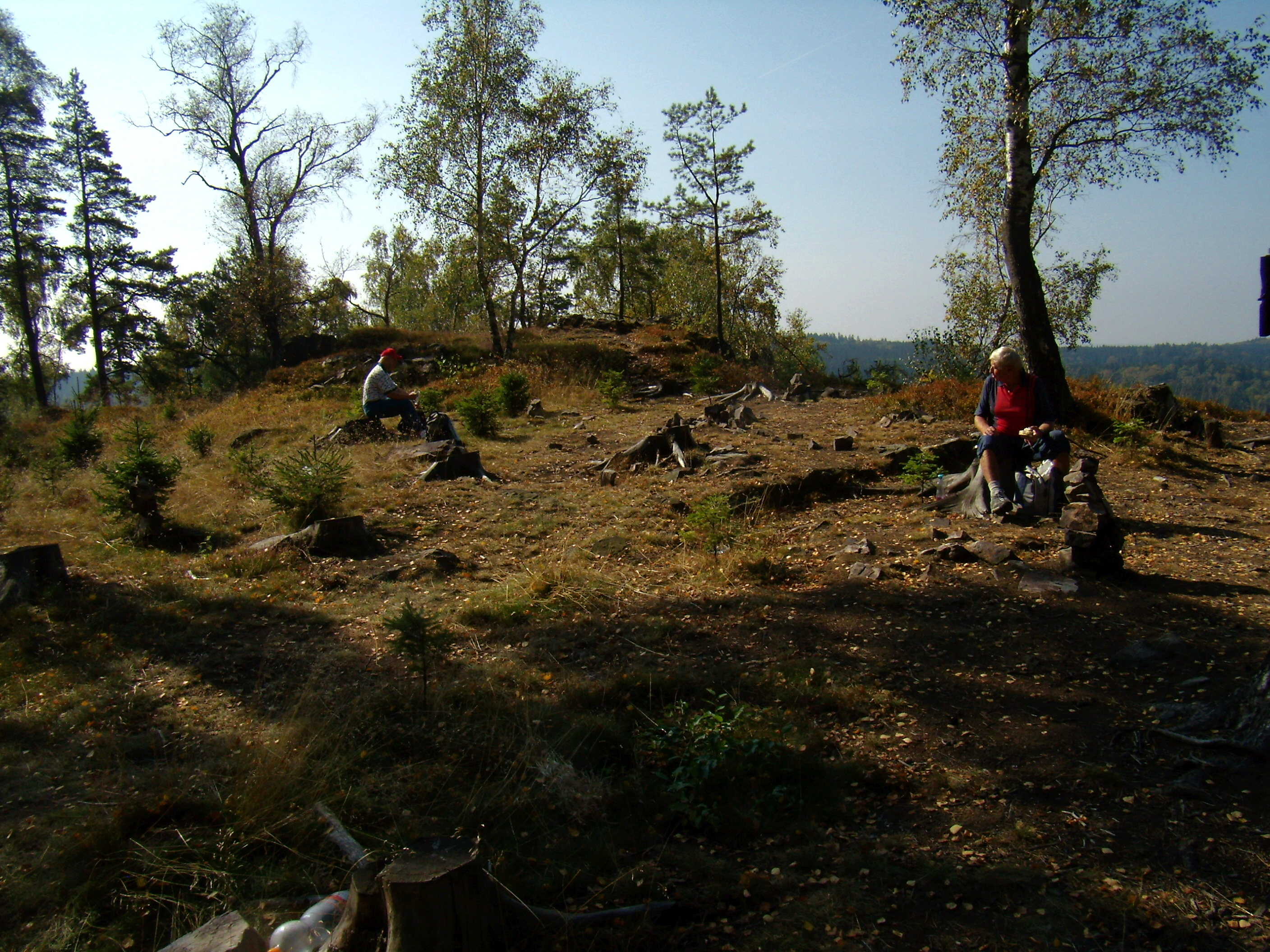 Výšinné opevněné sídliště - hradiště Bílá skála, archeologické stopy (Sklená Huť), 1,2 km východně od obce, Sklená Huť